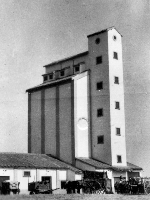 Silo - Alaejos (Valladolid) - Cuaderno. Álbum de Valladolid - Fotografía 42 x 60 B/N